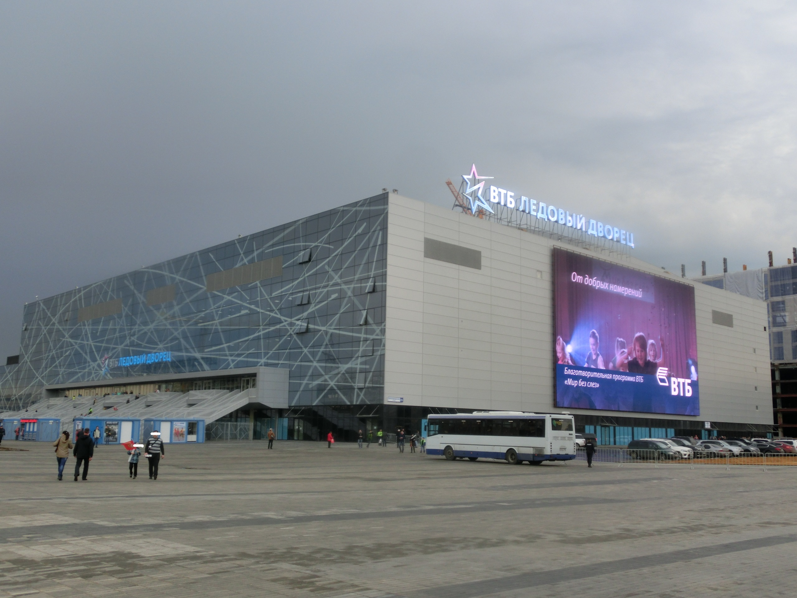 VTBアイスパレスの外観